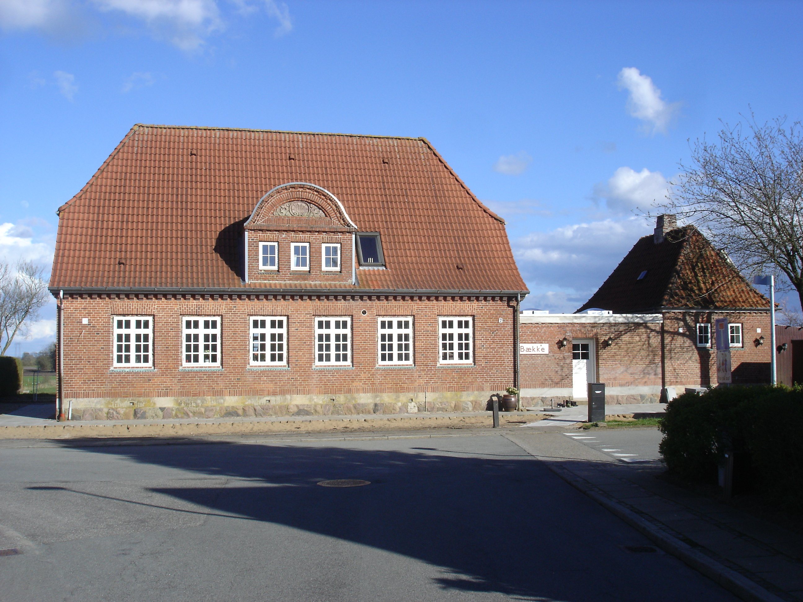 Bække Station, vejsiden fra NV